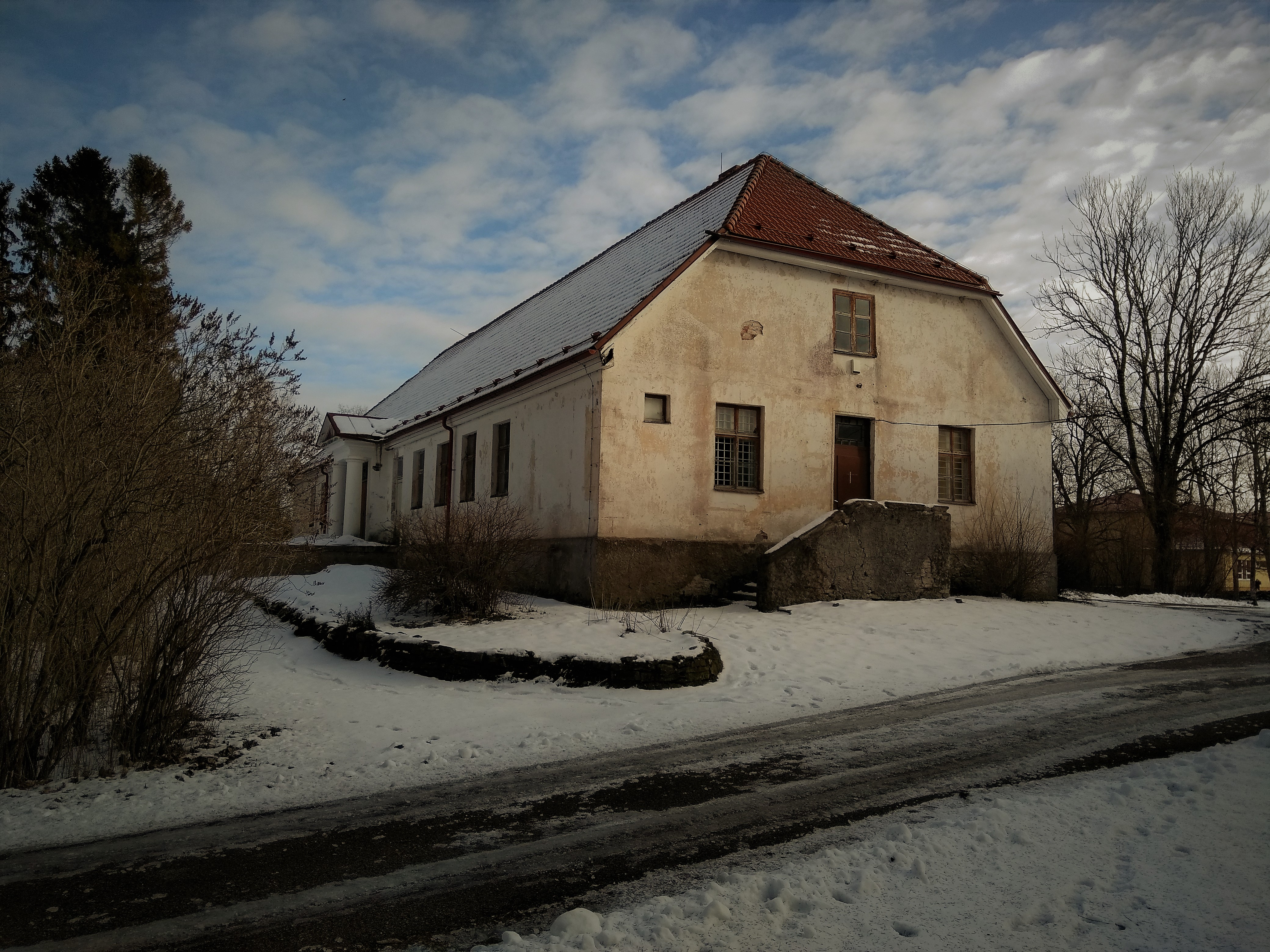 Vaade loodeküljelt Koonga mõisahäärberile, märtsis 2019 a.